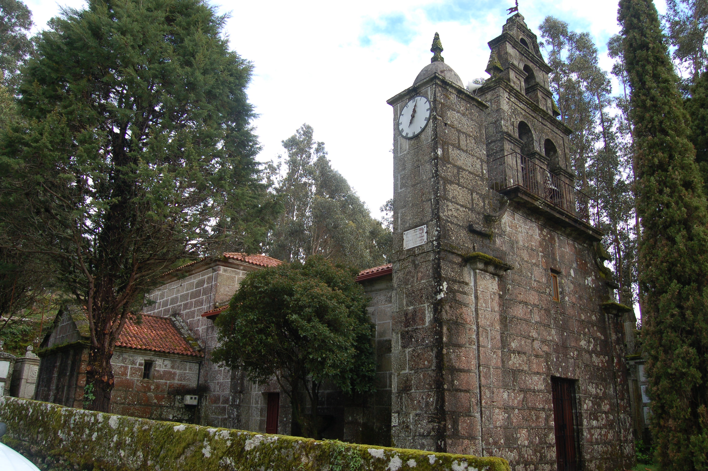 Igrexa parroquial de San Xosé da Laxe (Fornelos de Montes)